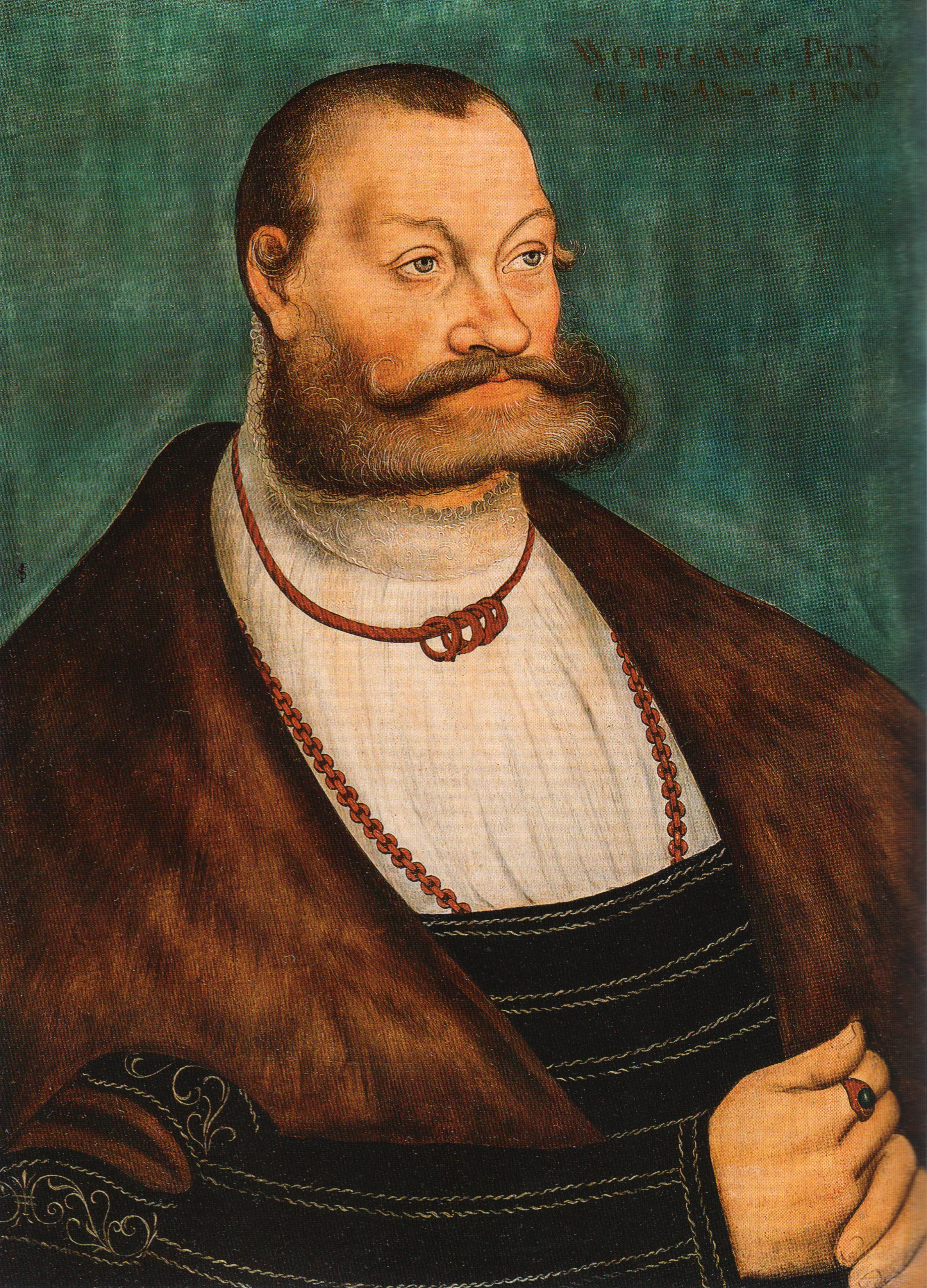 Portrait von Wolfgang von Anhalt-Köthen.